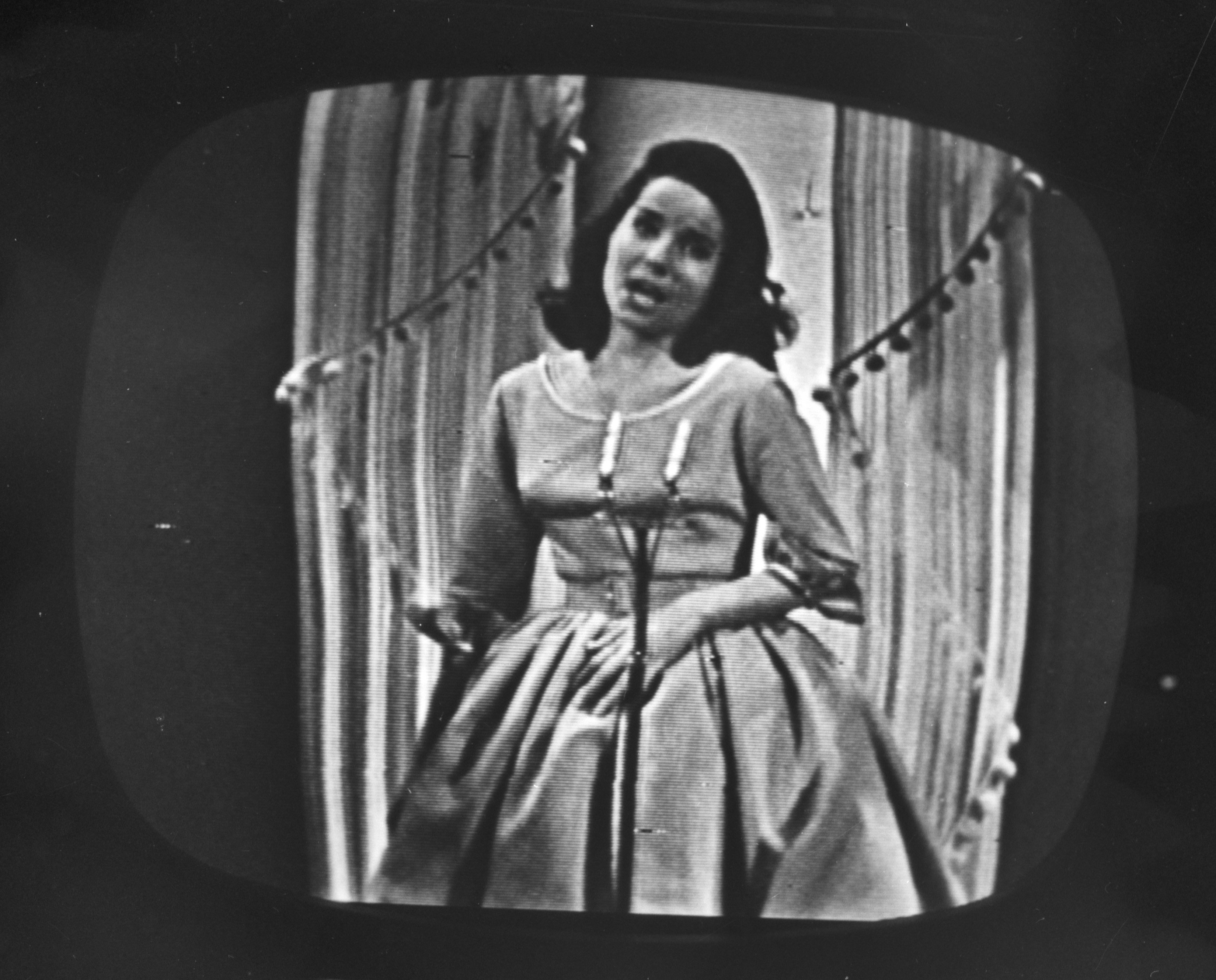 Collectie / Archief : Fotocollectie Anefo Reportage / Serie : [ onbekend ] Beschrijving : Eurovisie Songfestival 1960 te Londen. Opname van televisie. Winnares Jaqueline Boyer (Frankrijk) in actie Datum : 29 maart 1960 Locatie : Frankrijk, Londen Trefwoorden : artiesten, muziek, songfestivals Persoonsnaam : Boyer Jacqueline Fotograaf : Bilsen, Joop van / Anefo Auteursrechthebbende : Nationaal Archief Materiaalsoort : Negatief (zwart/wit) Nummer archiefinventaris : bekijk toegang 2.24.01.04 Bestanddeelnummer : 911-1300